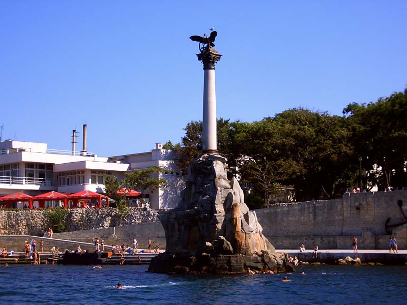 Adlersäule, Sewastopol Hafen, Ukraine